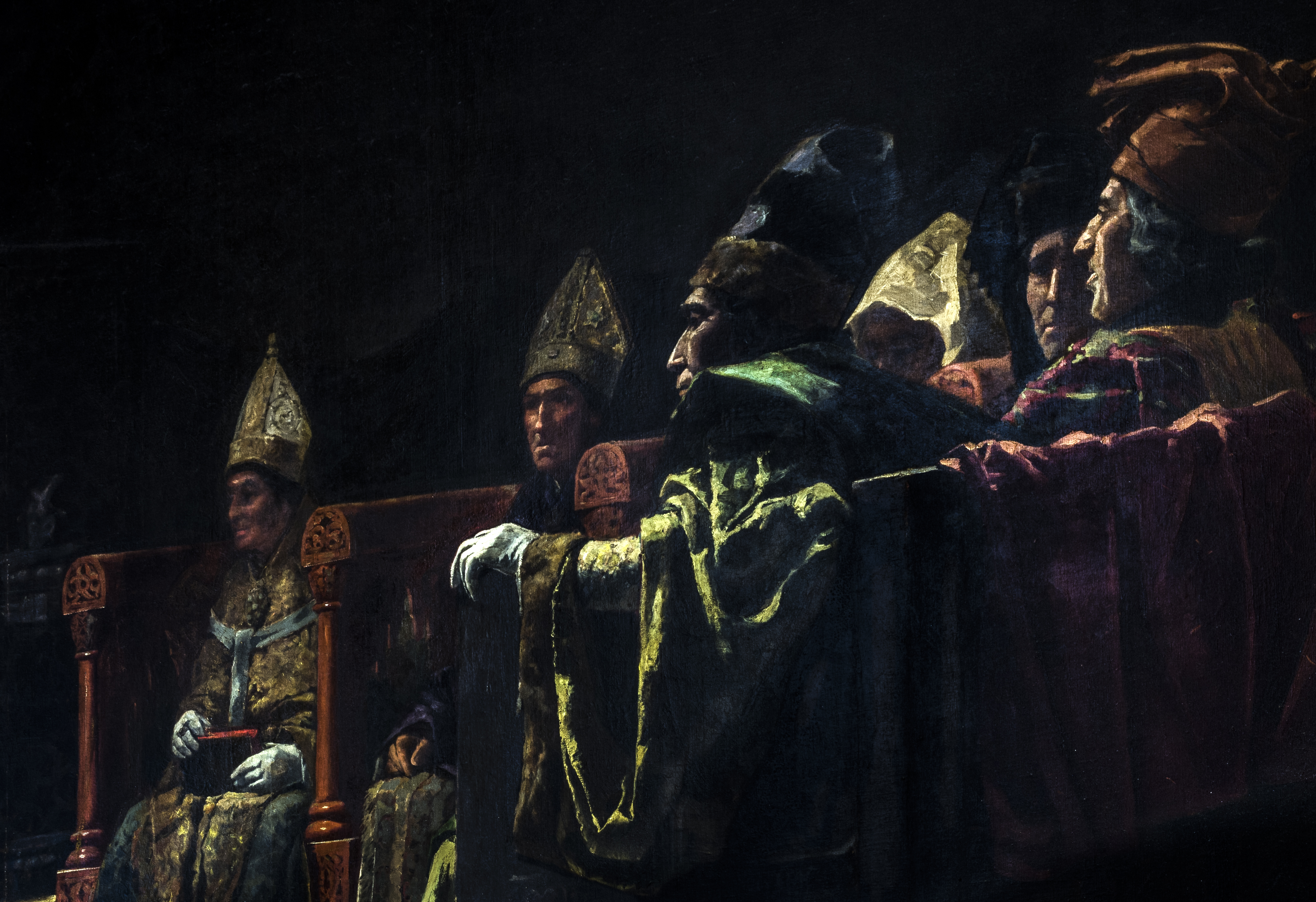 La obra representa el Compromiso de Caspe, suscrito en 1412 y en el que se acordó que el infante Fernando de Castilla (1380-1416), que era hijo del rey Juan I de Castilla, ocuparía el trono aragonés, que estaba vacante desde la muerte del rey Martín I de Aragón. Este cuadro fue presentado en la Exposición Nacional de 1890, donde fue criticado negativamente por su excesiva teatralidad, aunque también fue elogiado su realismo. Y tras ser mostrado en Berlín, su autor, que era en esa época concejal de Cultura del Ayuntamiento de Sevilla, lo cedió a esta institución en 1901.